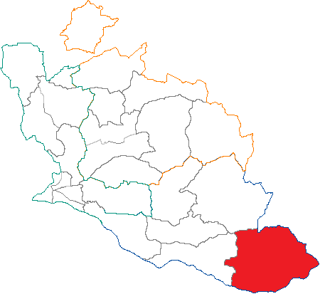 Situation du canton dans le département de Vaucluse (France)